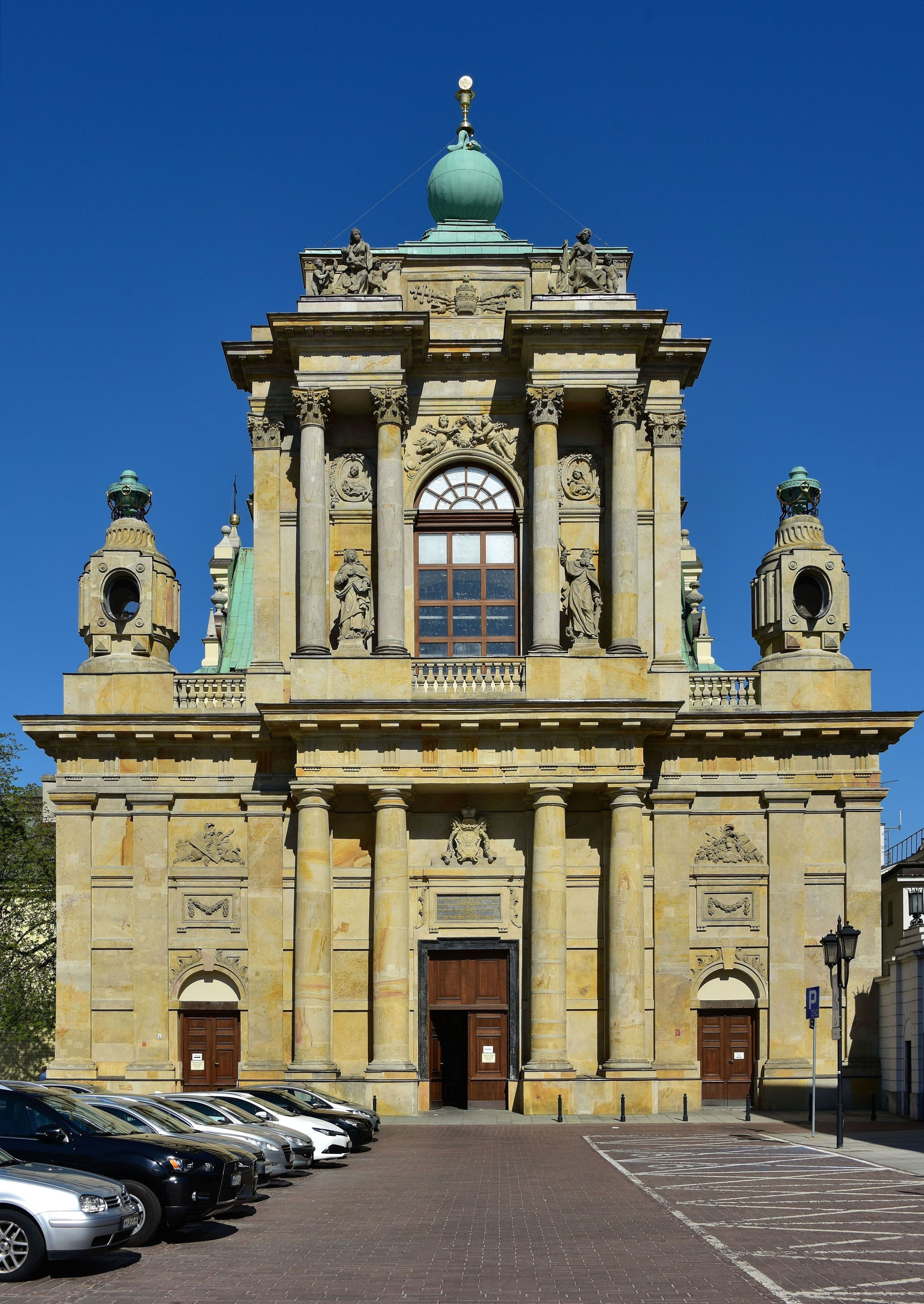 Kościół Wniebowzięcia Najświętszej Maryi Panny i św. Józefa Oblubieńca (pokarmelicki) w Warszawie